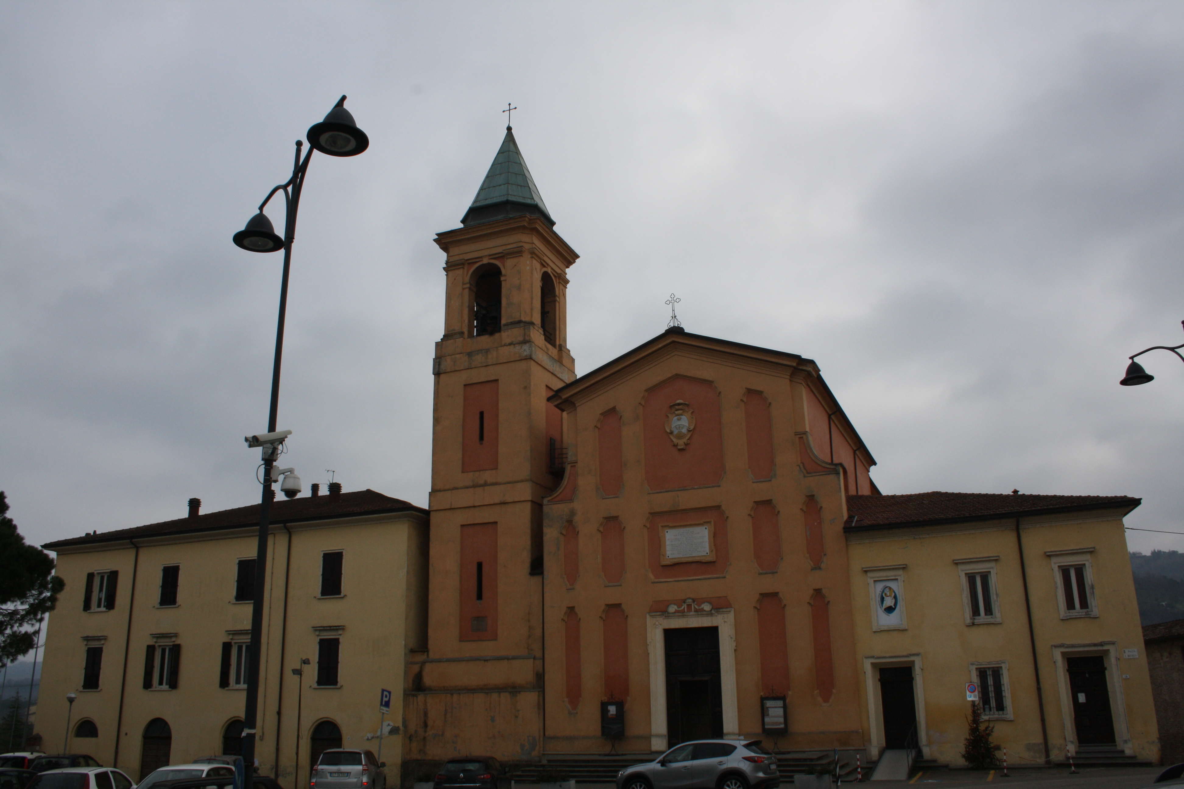 Duomo o Concattedrale Santo Stefano Papa di Modigliana